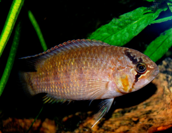 Hannfisk av Ivanacara adoketa - male Nannacara adoketa